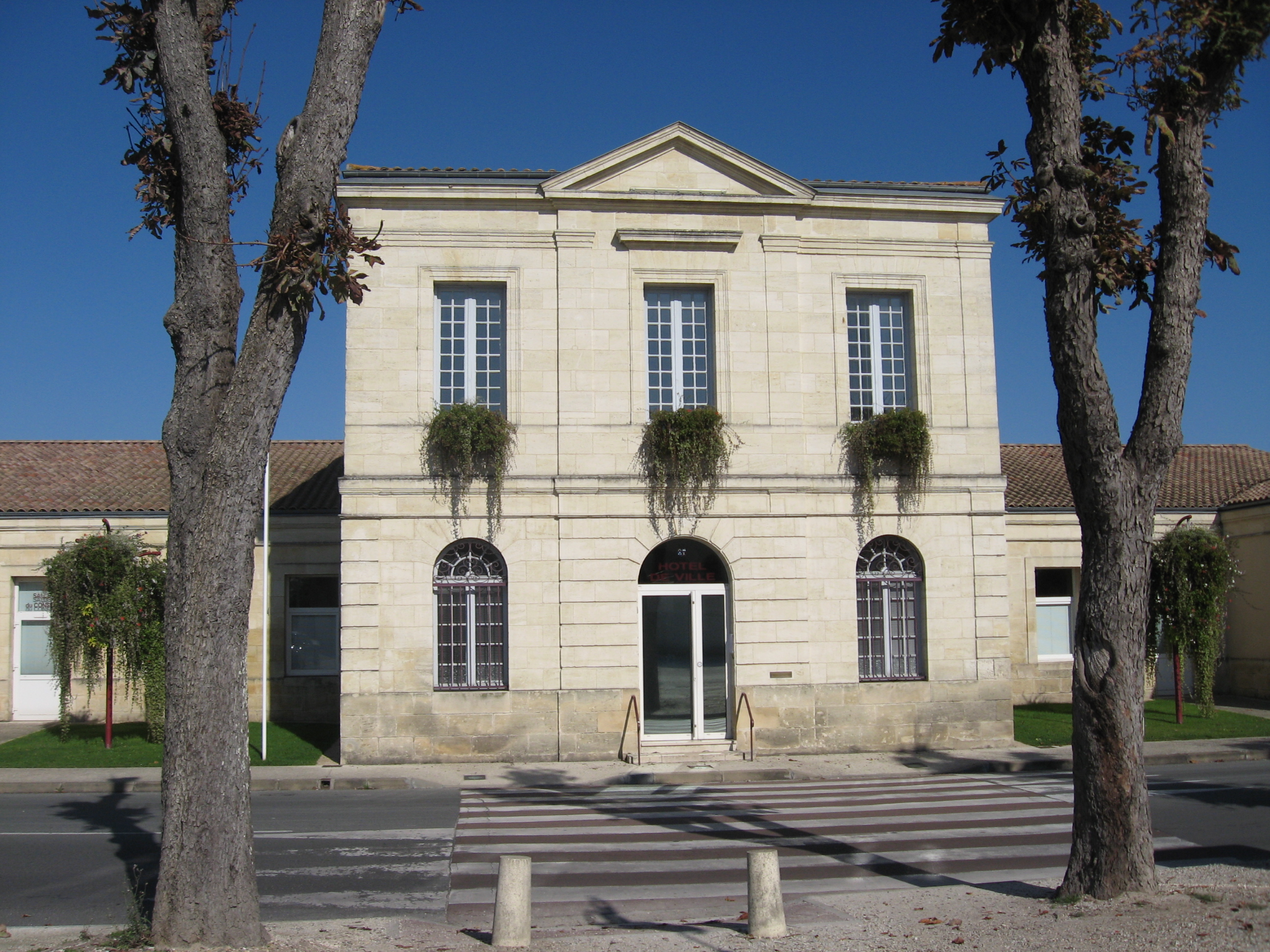 La mairie de Cadaujac (Gironde)